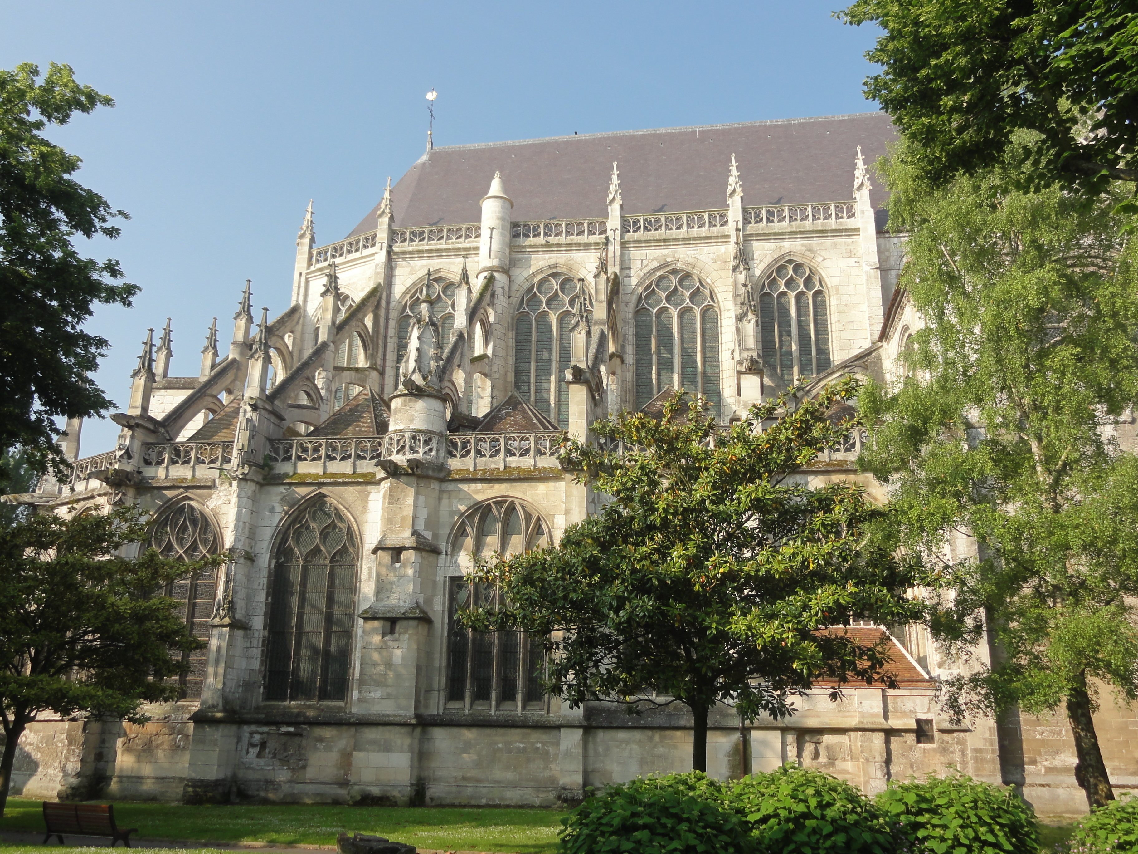 Chœur, vue depuis le nord.